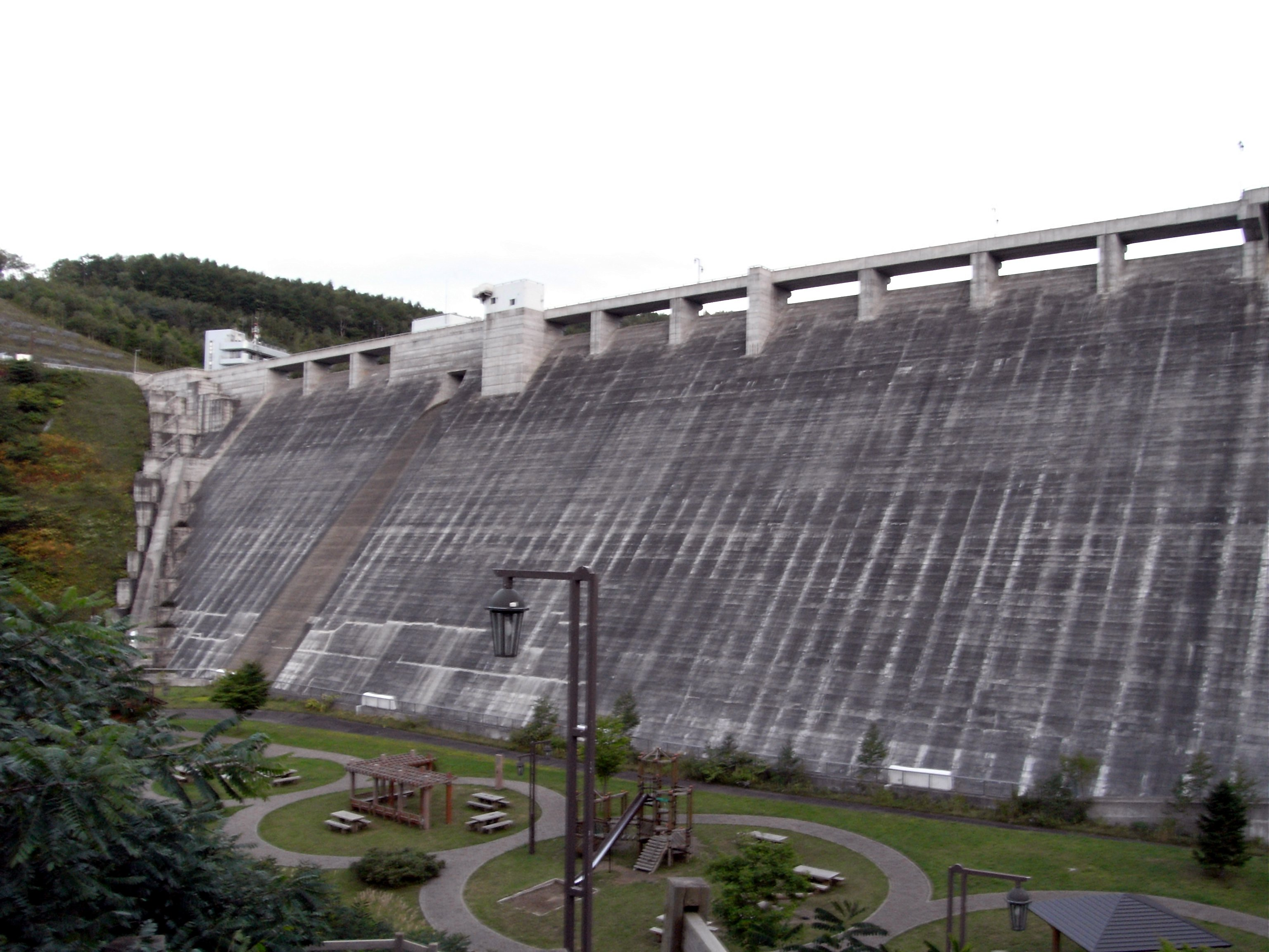 Dam